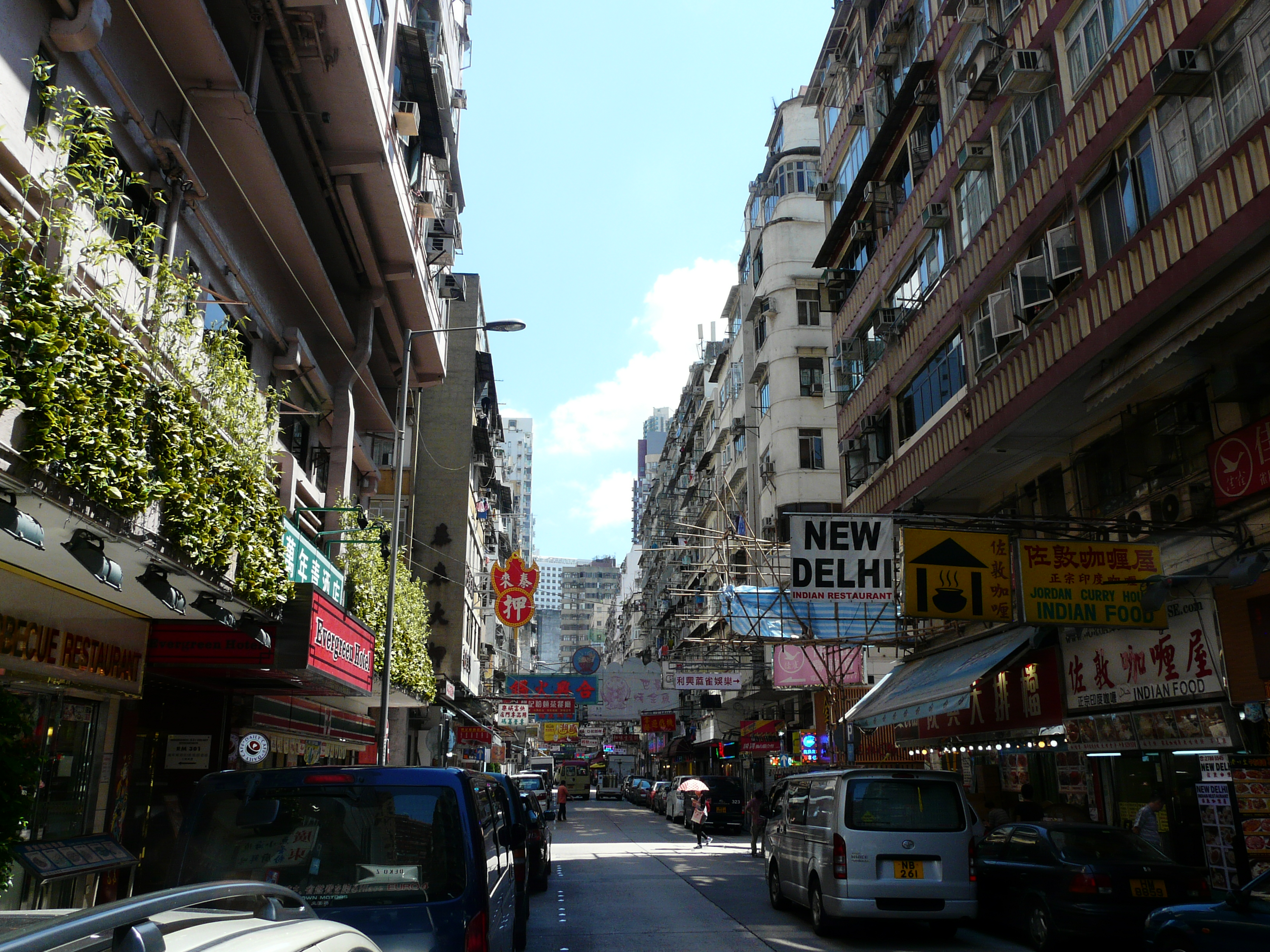 Hong Kong, 2013